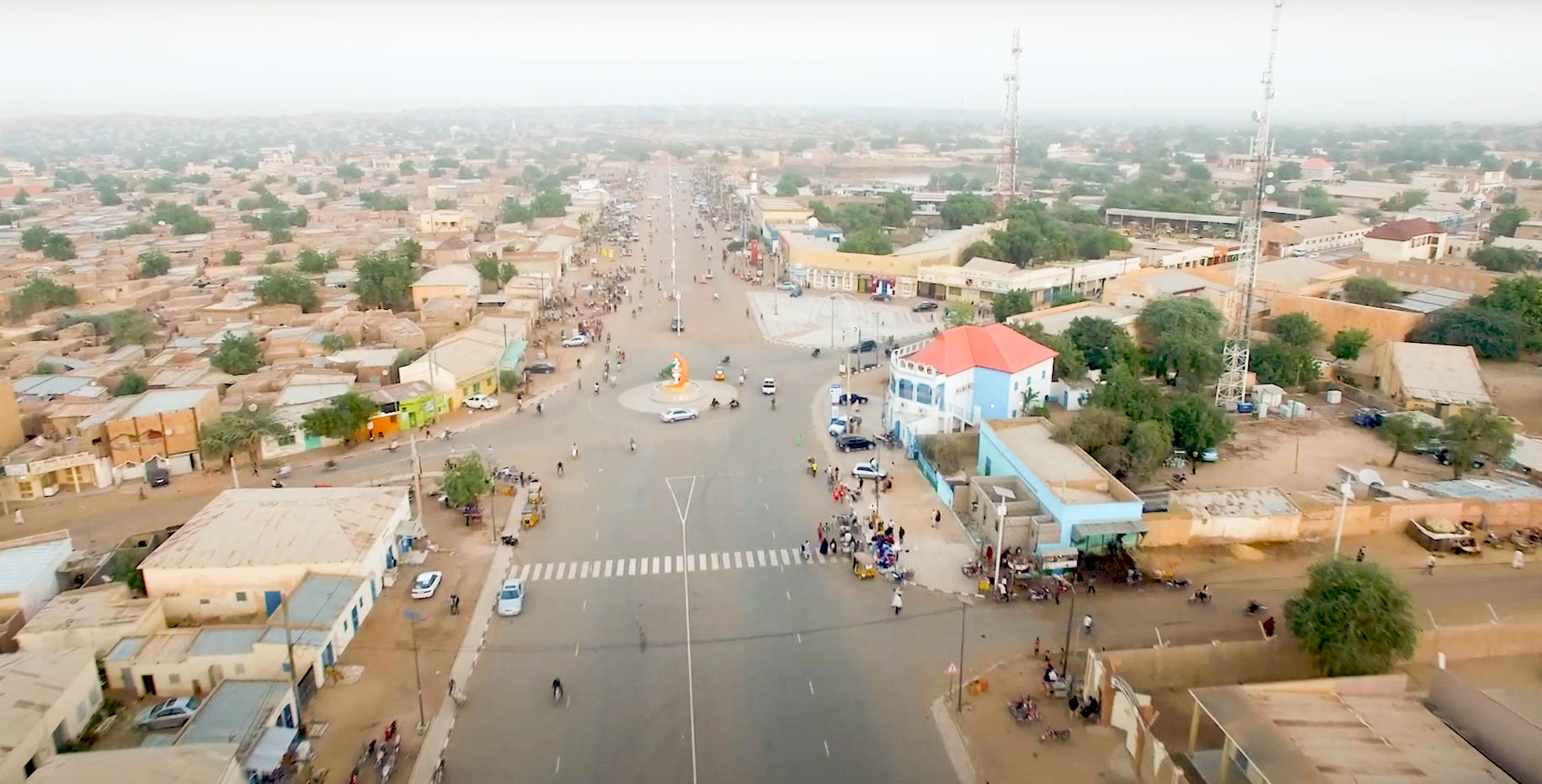 Zinder centre ville